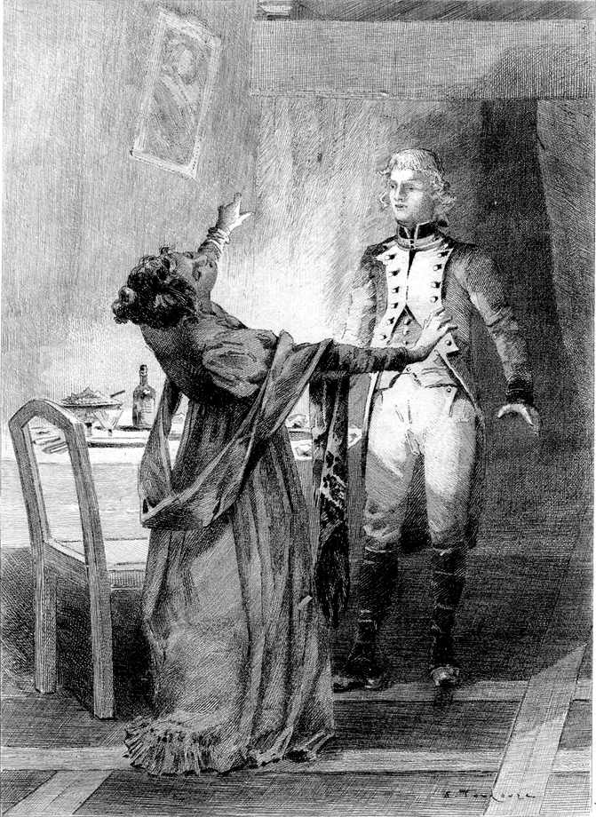 Title page of Honoré de Balzac's Adieu ! (1812).